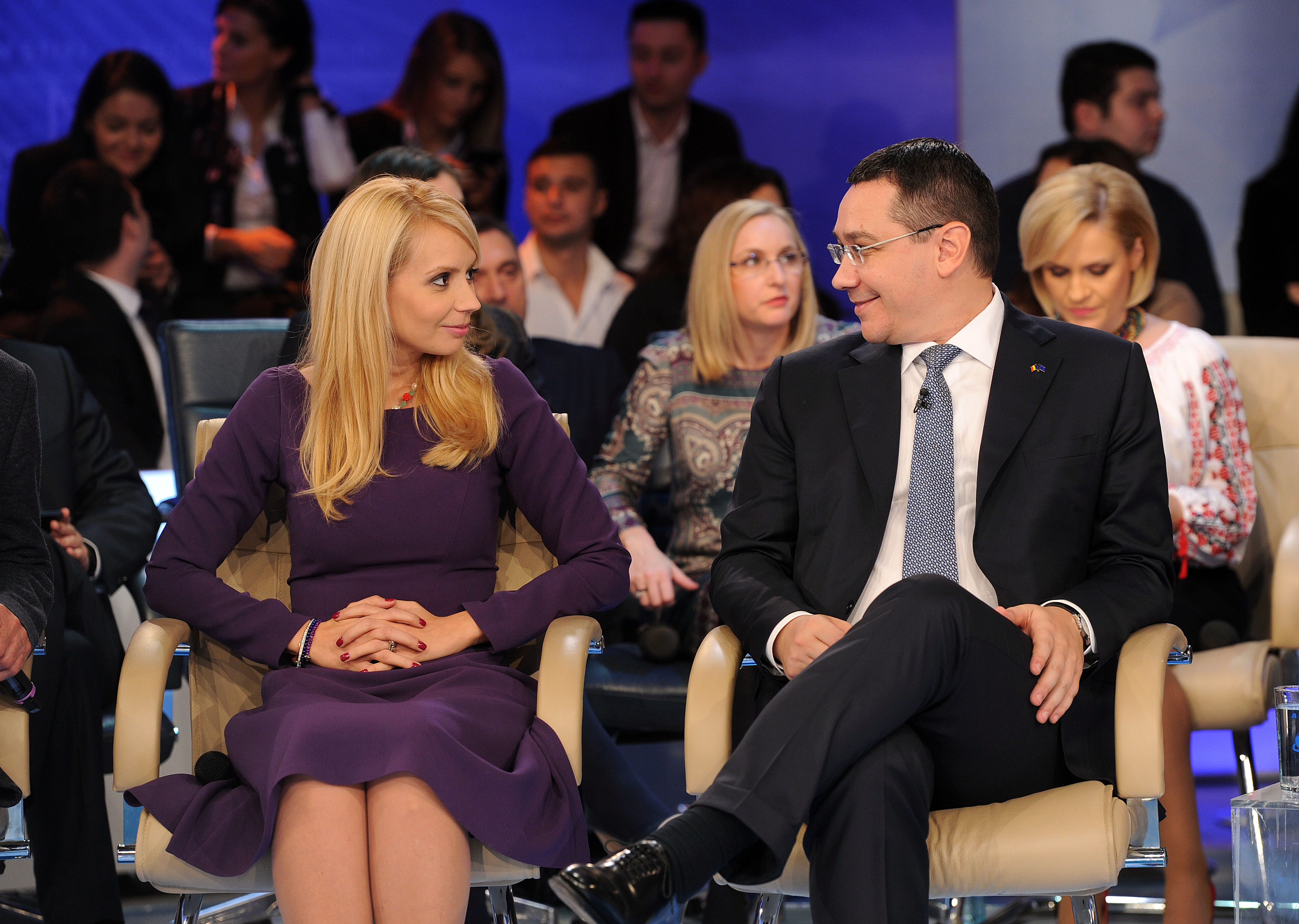 Victor Ponta la dezbaterea de la Antena 3 - 13.11 (9)